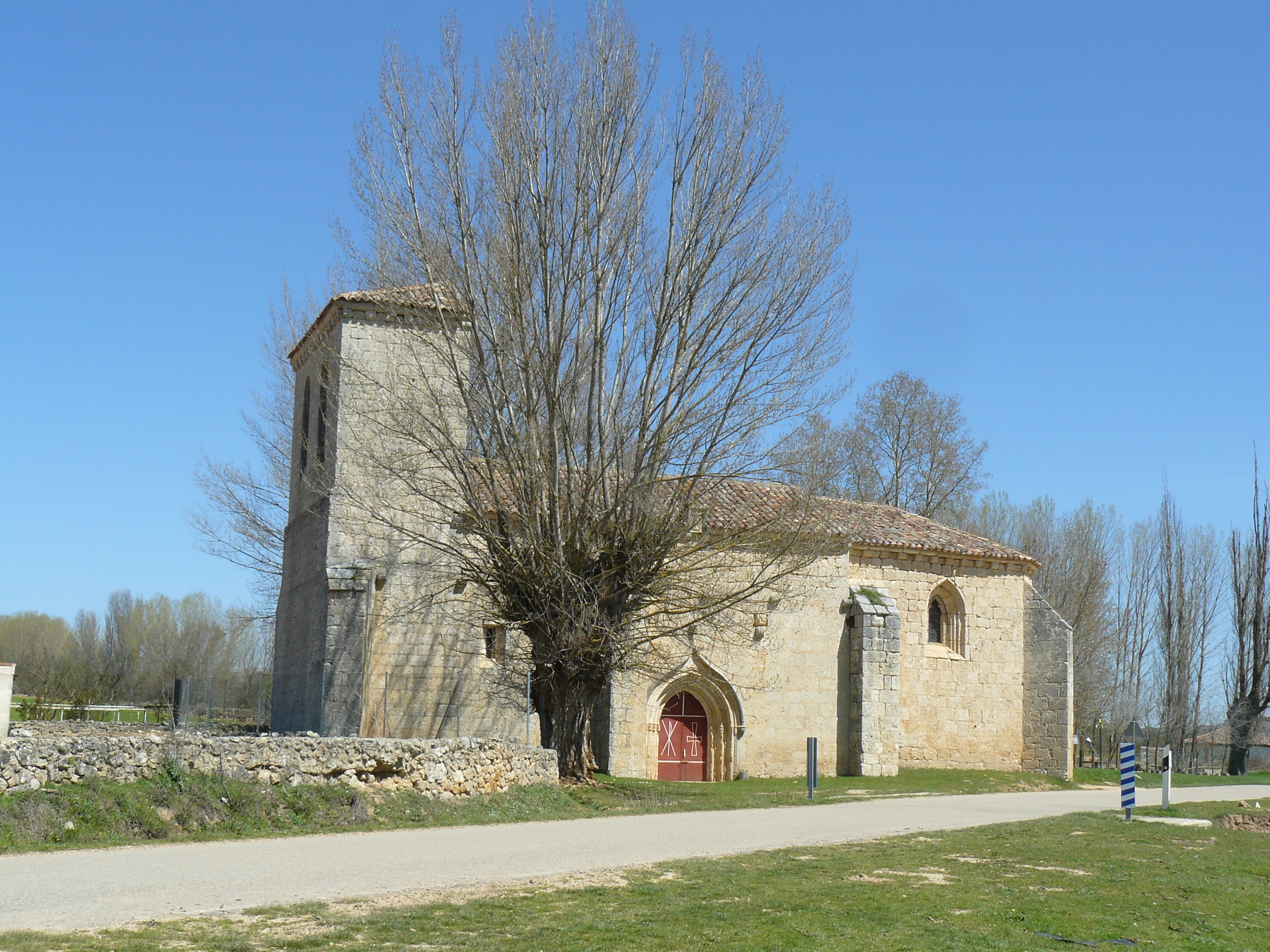 Ermita de San Juan o de Monzón, Gumiel del Mercado, Burgos.